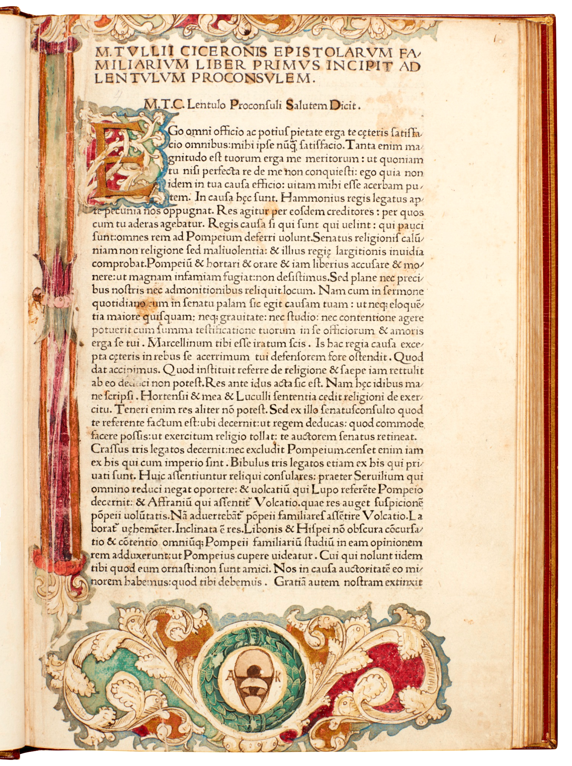 Epistolae ad familiares de Marco Tullio Cicerón, edición princeps de Juan de Espira (Venecia, 1469). Primera página iluminada.